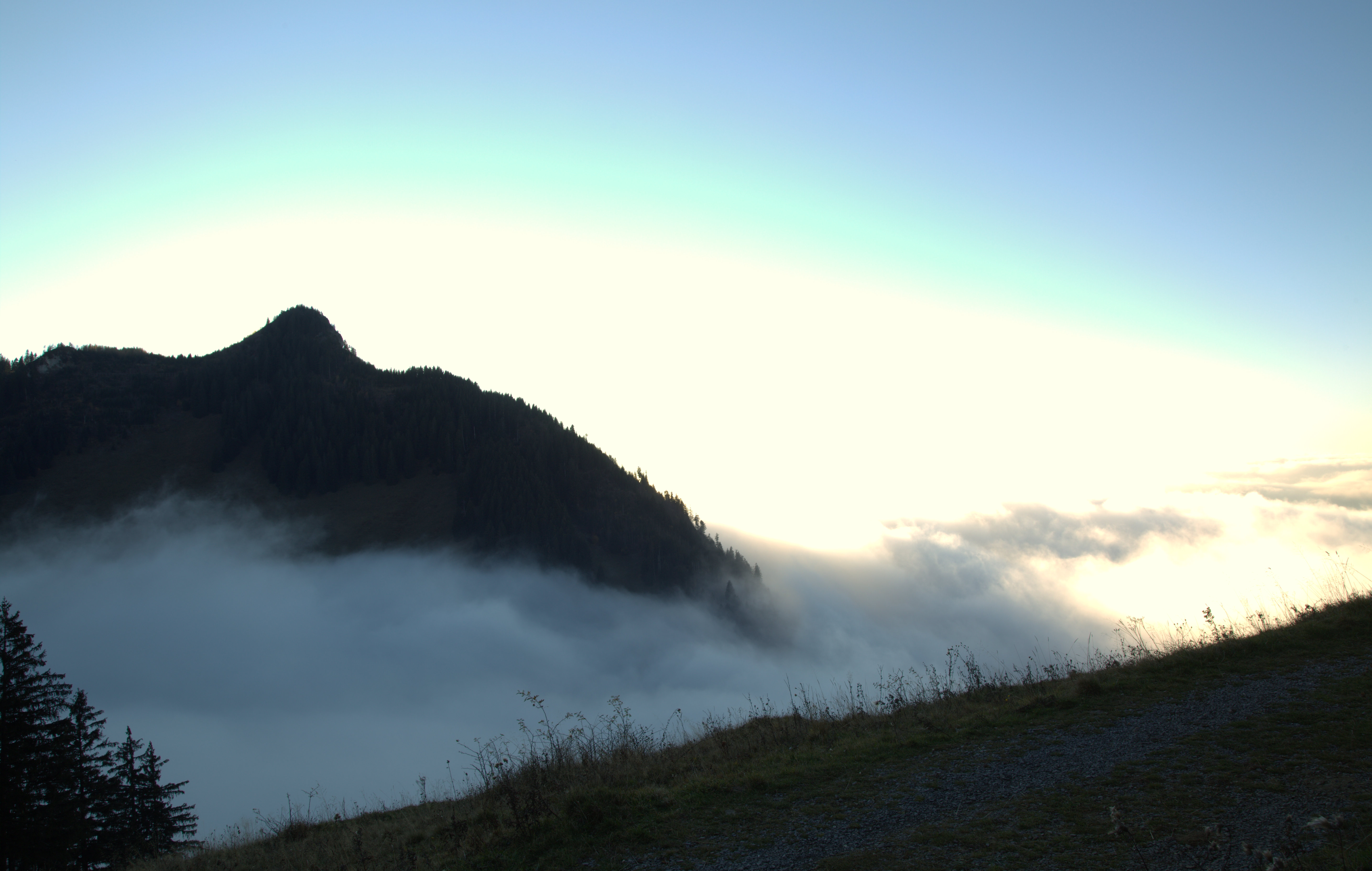 Bei Nebel lohnt sich ein Ausflug zum Staufen.